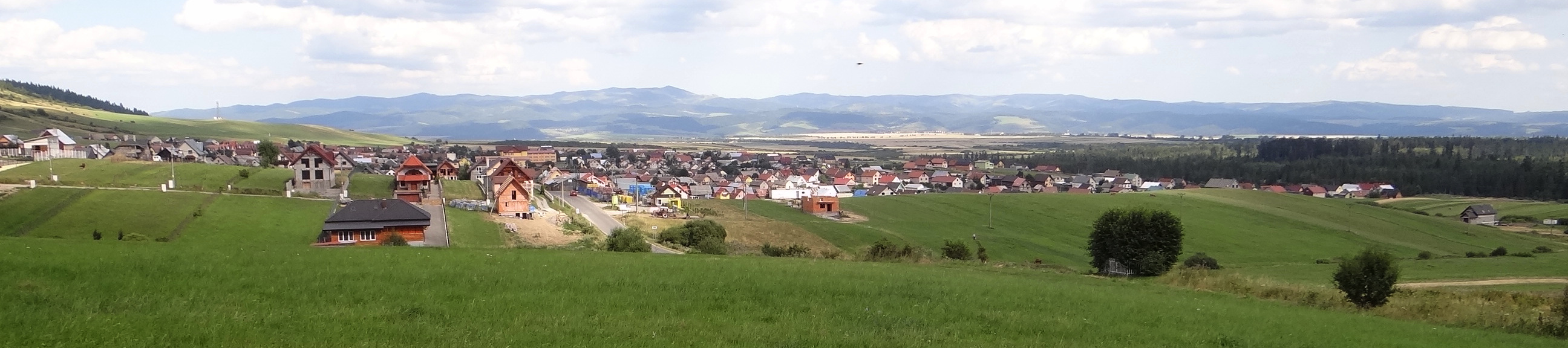 Lendak, widok ogólny